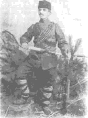 Вълко Шишманов.